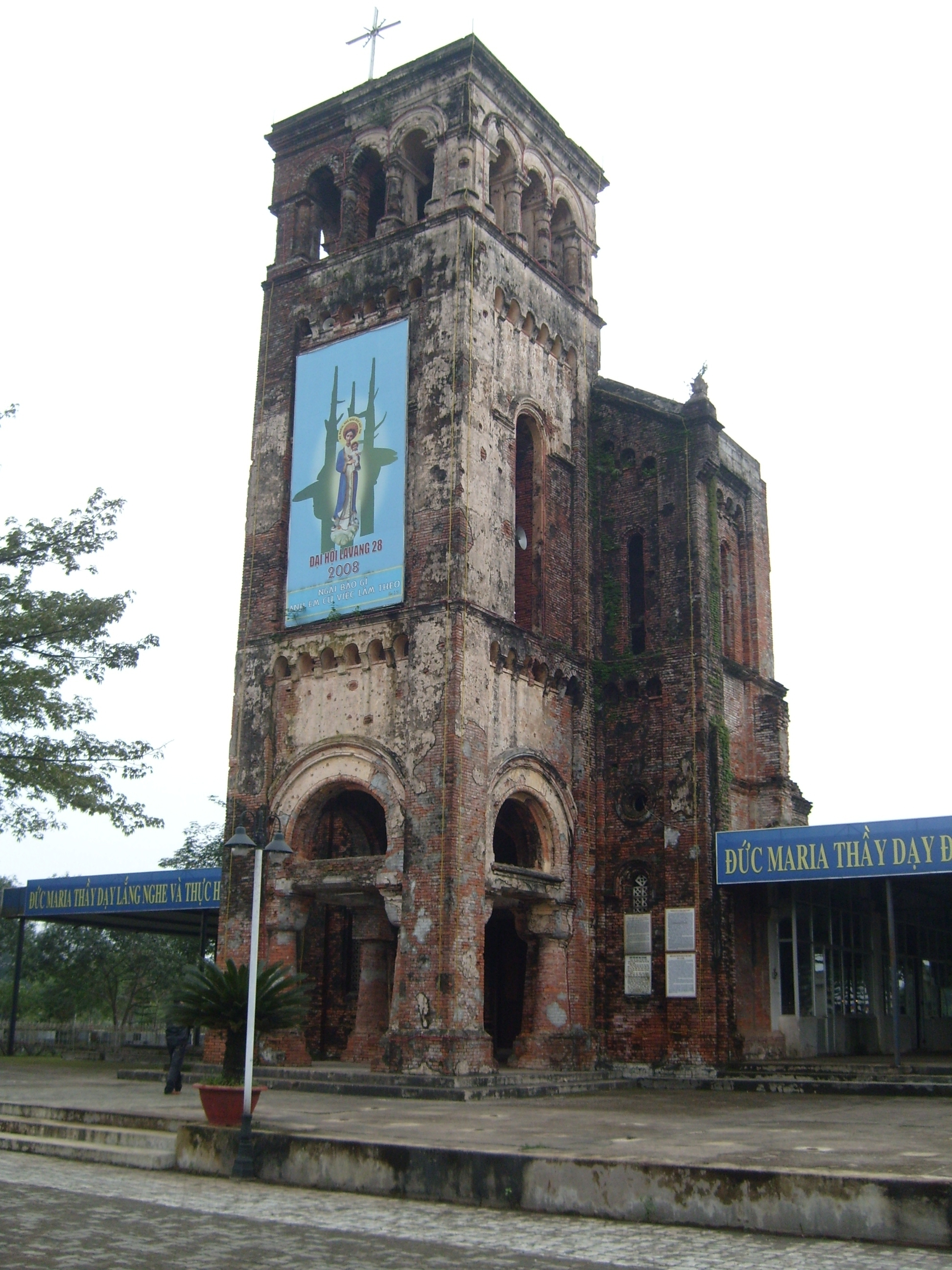 Thánh đường La Vang, theo nhượng quyền của 06 CDQT1